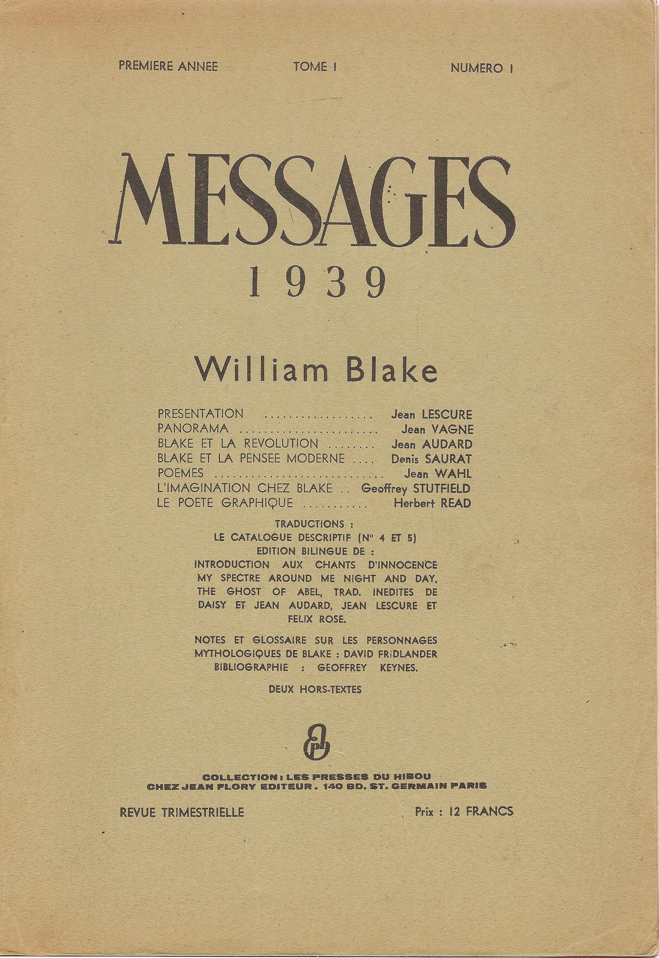 Messages, revue littéraire dirigée par Jean Lescure, 1er numéro 1939